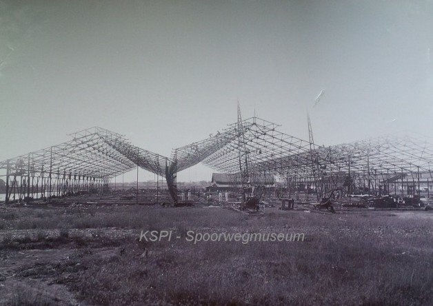 Proses pembangunan Balai Yasa Pengok.